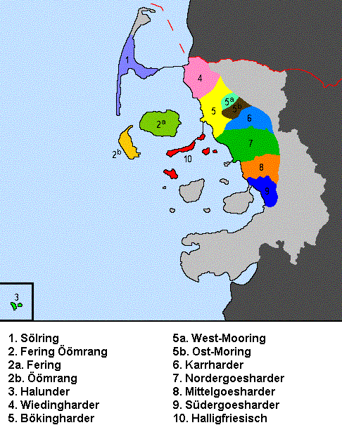 Karte der verschiedenen Dialekte der Nordfriesischen Sprache.